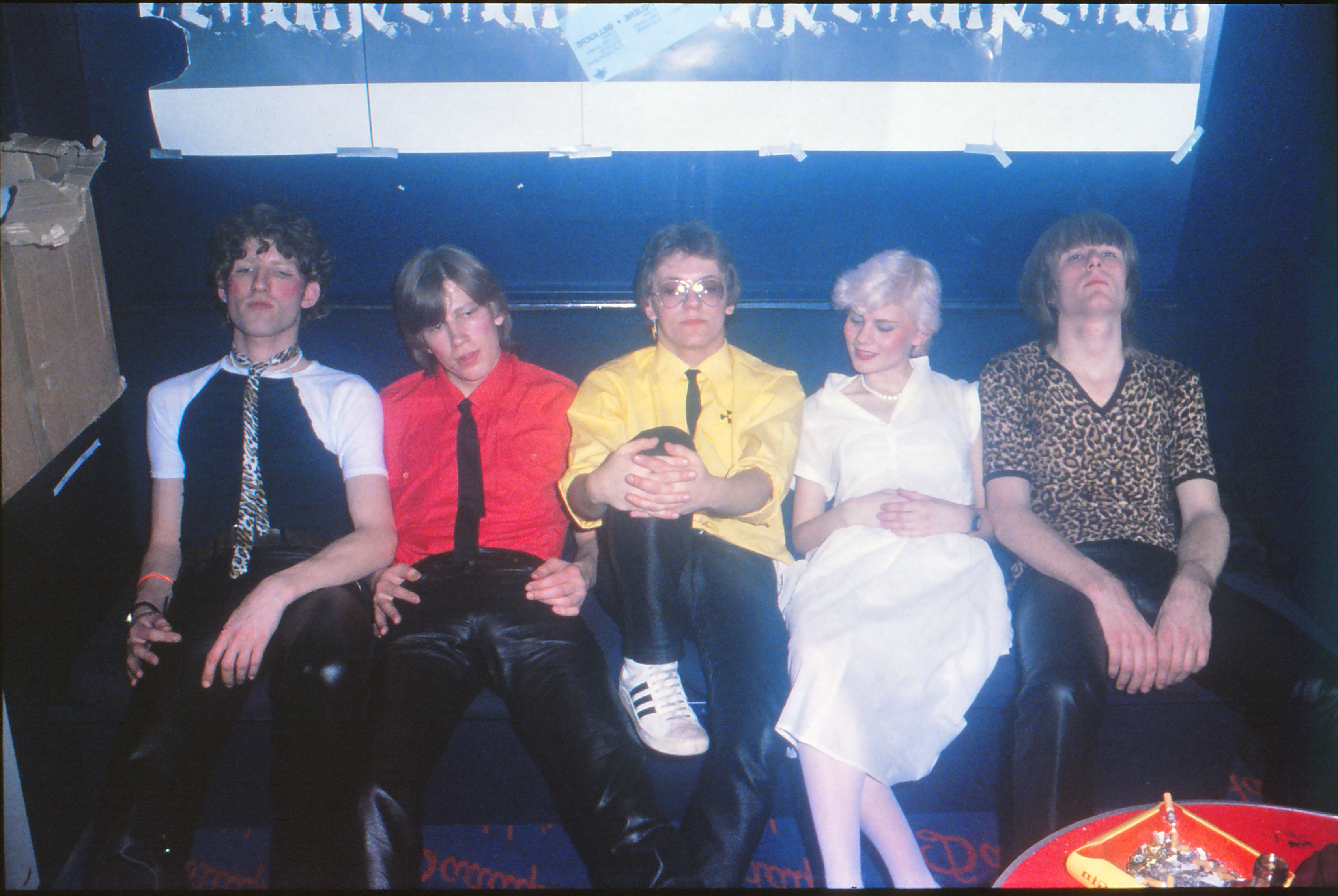 The Pin-Ups: Carsten Løhde Petersen, Kim Løhde Petersen, Michael Hillerup, Katrine Ring, Niels Nahmesen